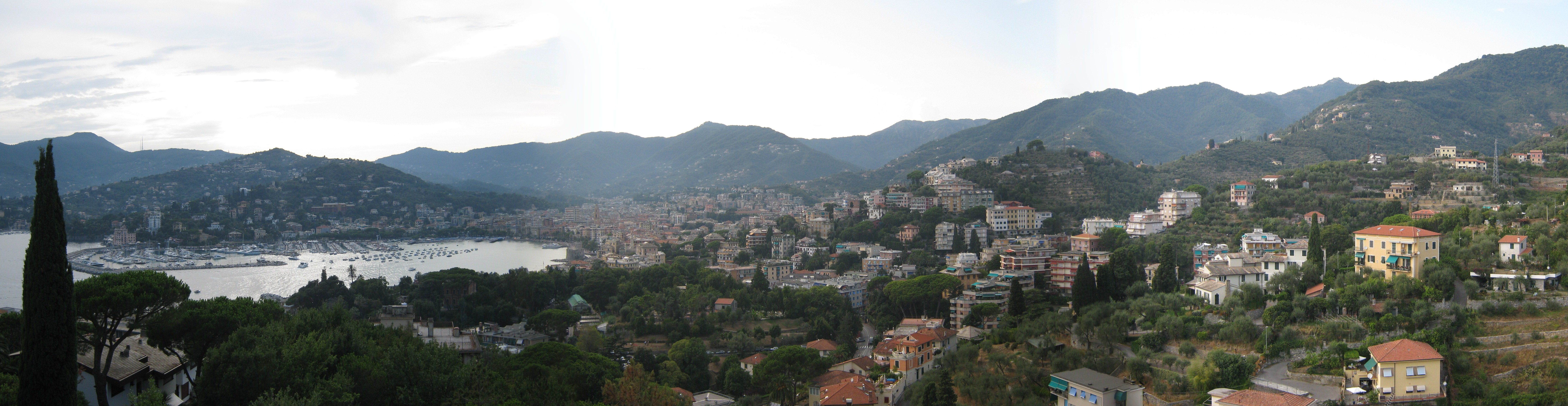 Panorama della città di Rapallo, raffigurante la baia e le colline antecedenti alla città.